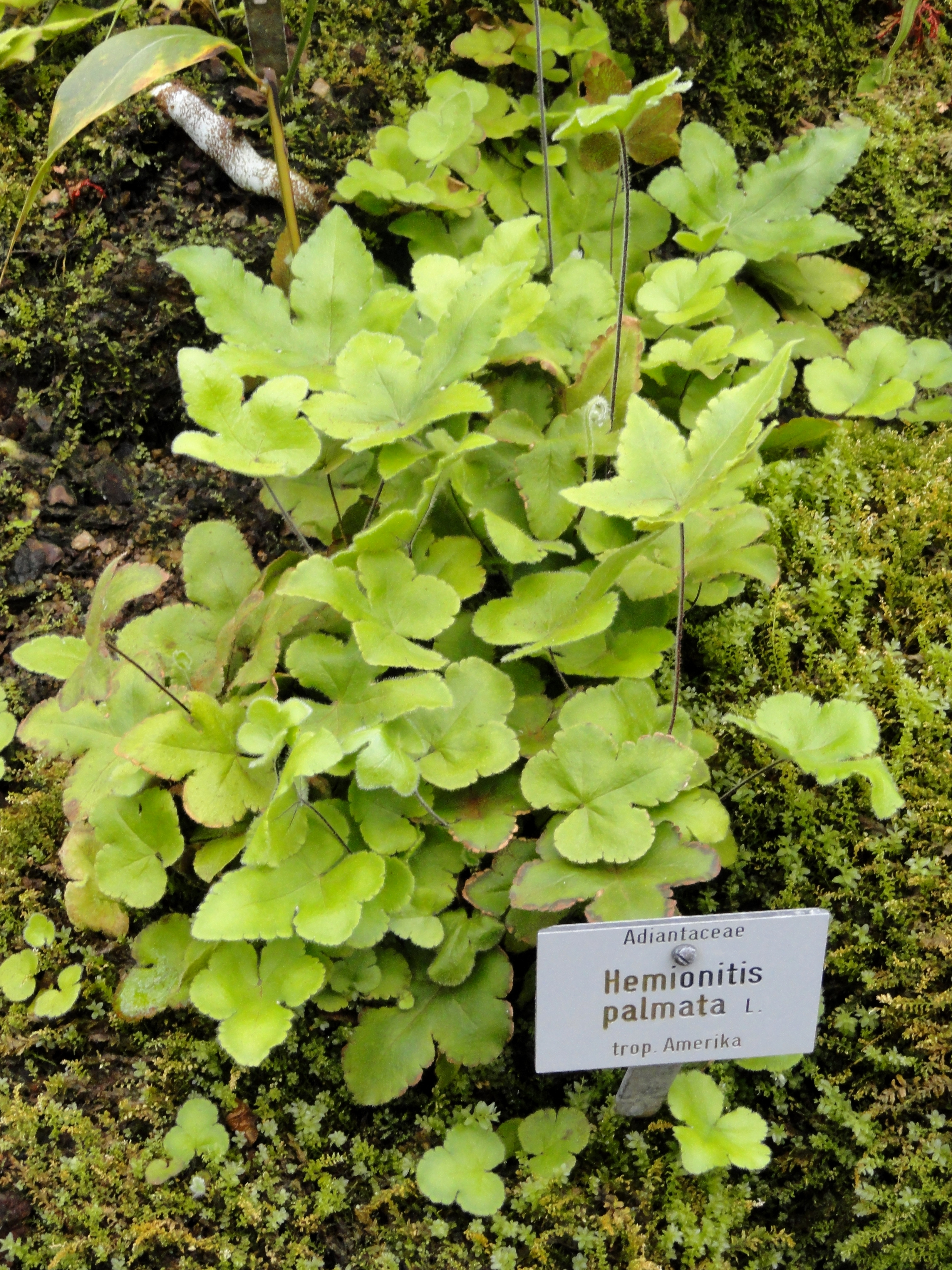 Hemionitis palmata specimen in the Botanischer Garten München-Nymphenburg, Munich, Germany.